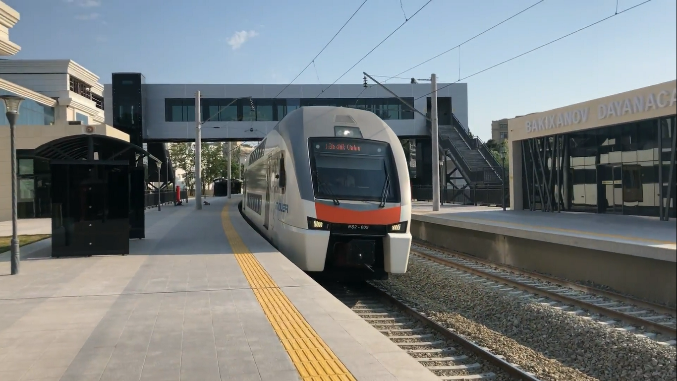 Электропоезд ЭШ2-009 "Stadler" на подъезде к платформе "Бакиханов"